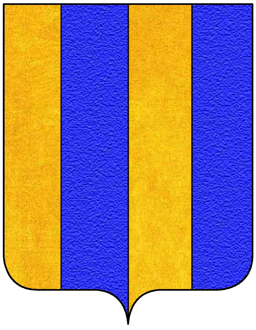 Stemma della famiglia Carosini (Venezia)